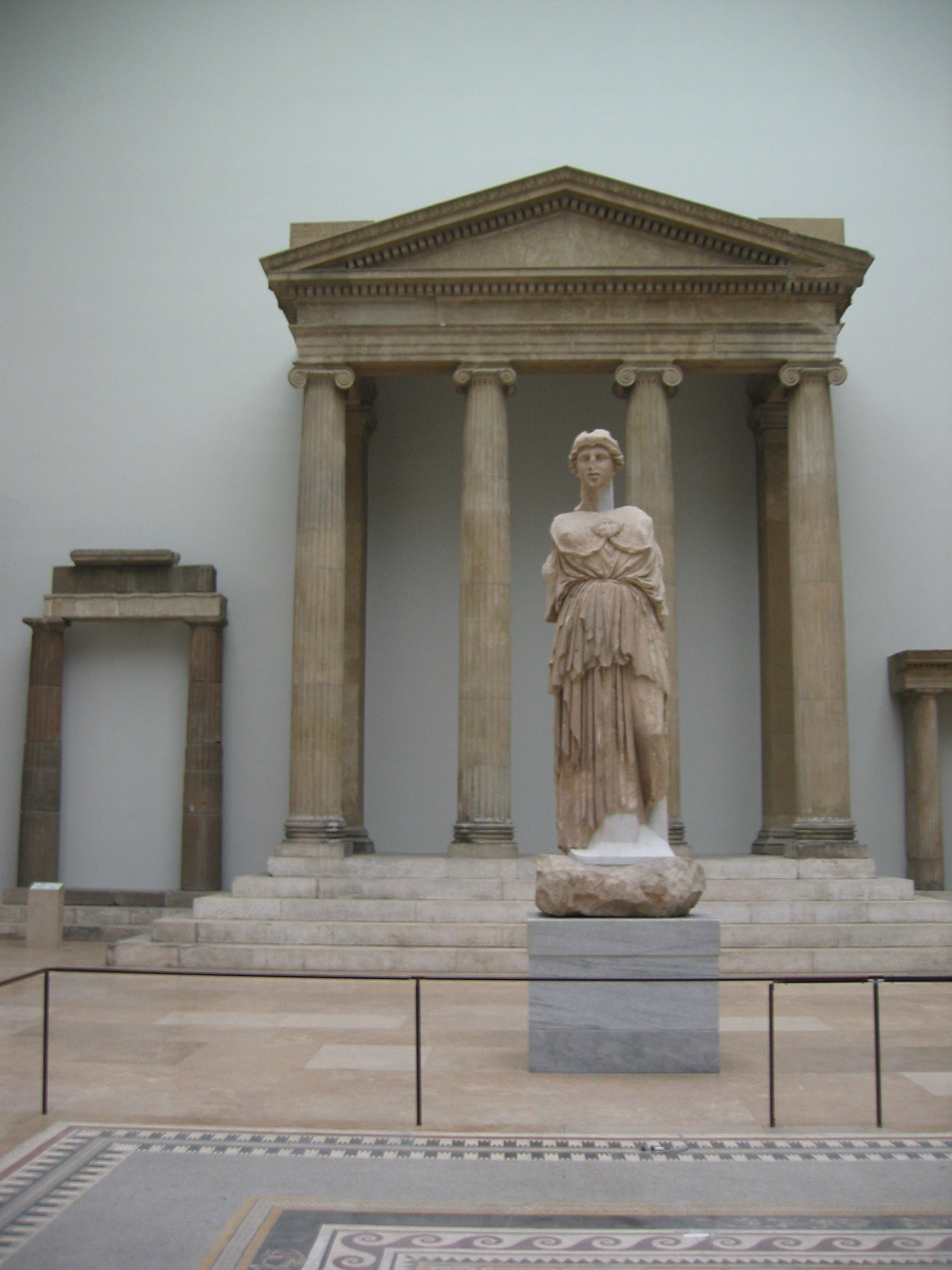 Tempel des Zeus Sosipolis von Magnesia am Mäander, hellenistisch, Beginn des 2. Jahrhunderts v. Chr.